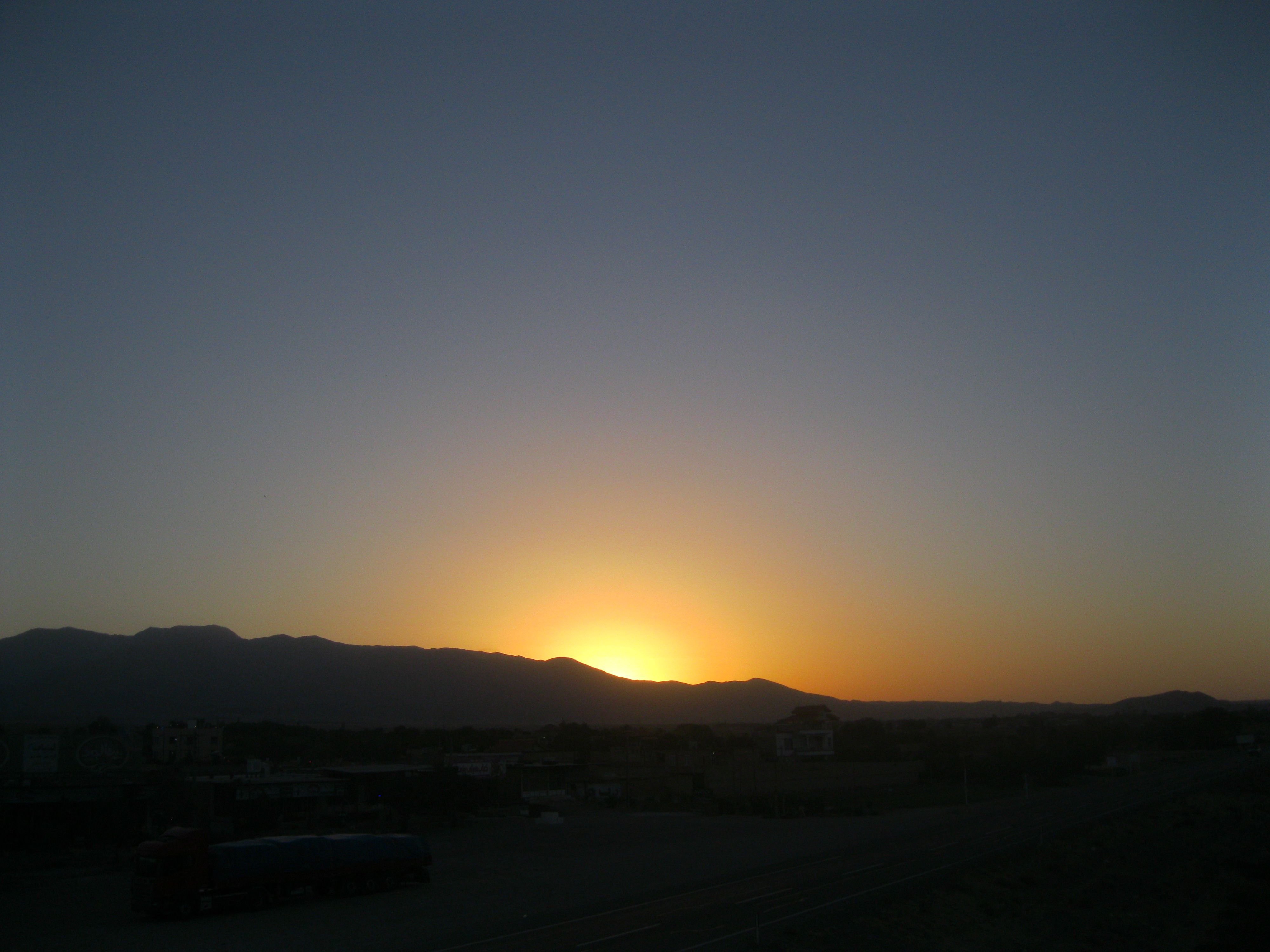 نمایی از طلوع خورشید از پشت رشته‌کوه بینالود از روی پل هوایی جاده مشهد نیشابور- حاجی‌آباد زبرخان- 3 مهر 1395 - عکاس: محمد محمدی